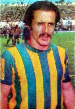 Jorge Carrascosa